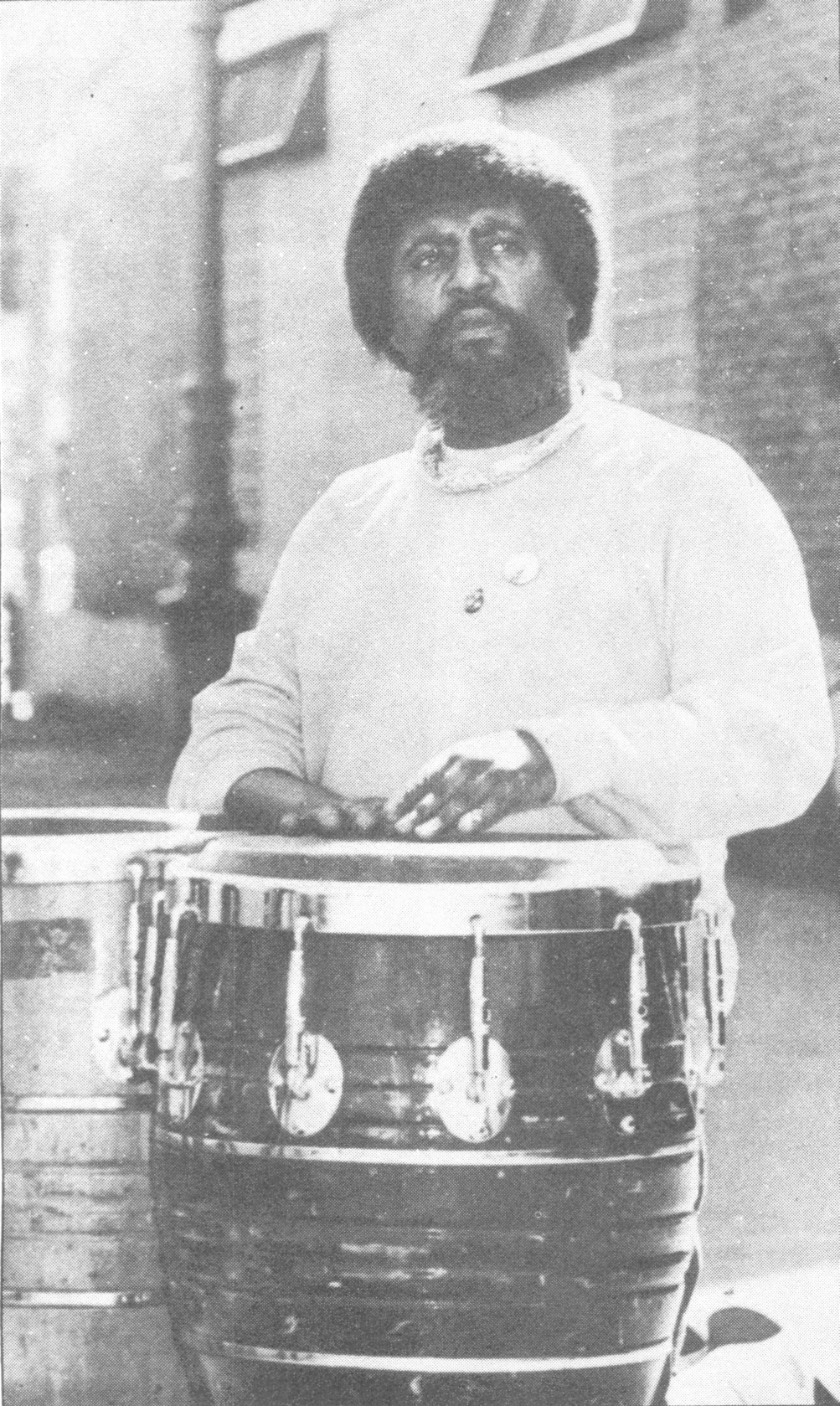 Fotografía del cantante uruguayo Rubén Rada, tomada en Argentina para la revista "Canta Rock", año 1 nº10 de 1984.